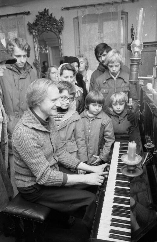 ADN-ZB / Rehfeld / 3.3.77 / Berlin: Wie ein altes Pianola klingt, interessiert heute nicht nur Kinder und Jugendliche. Im Gründerzeit-Museum in Berlin-Mahlsdorf führt der Inhaber Lothar Berfelde (l.), ehrenamtlicher Mitarbeiter der Denkmalpflege, seinen Gästen gern die historischen Instrumente vor. Er hat 33 Jahre lang Möbel und Hausrat der Gründerzeit gesammelt und macht diese Schätze seit 1960 der Öffentlichkeit zugänglich. Zu sehen sind fünf komplette Zimmereinrichtungen, eine historische Gastwirtschaft, Musikautomaten und -instrumente, Grammphone, Uhren und andere Gegenstände. Führungen finden sonntags um 11 und 12 Uhr statt, Werktags nach Anmeldung. Das Haus steht am Hultschiner Damm 333. Abgebildete Personen: Berfelde, Lothar: Inhaber des privaten Gründerzeitmuseums Berlin-Mahlsdorf, DDR (GND 119092093)